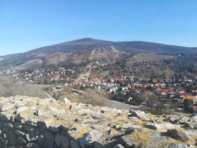 Widok na Devín z murów obronnych zamku